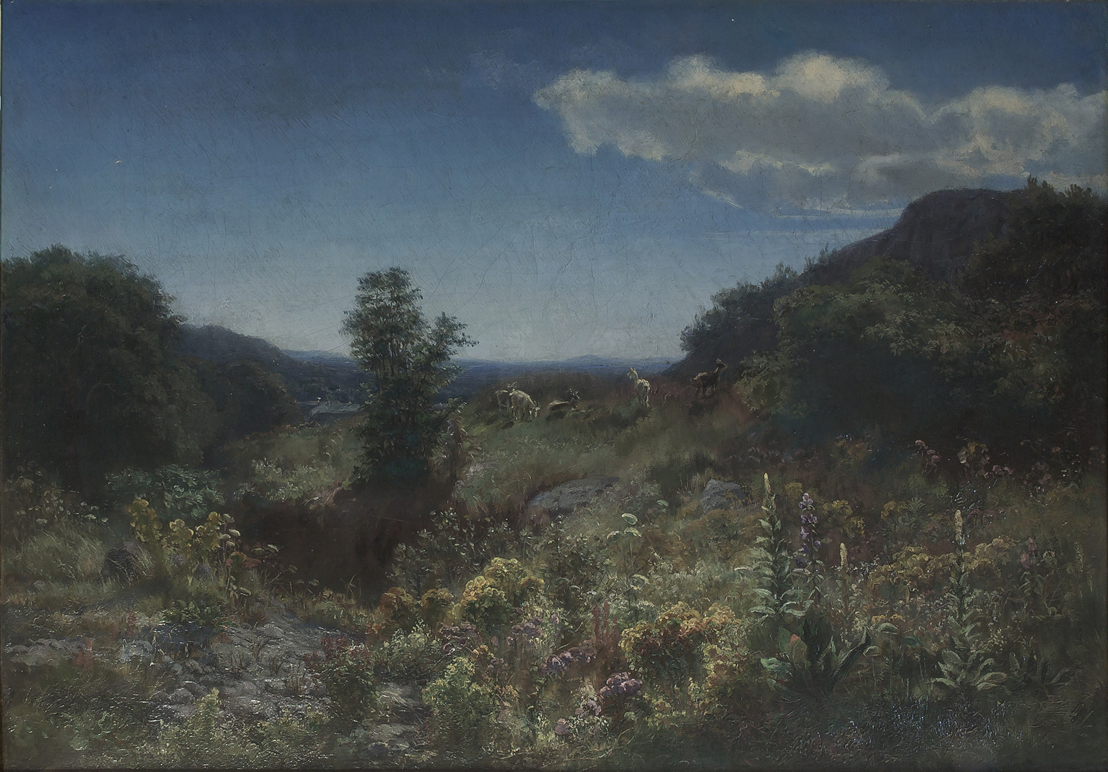 Ölgemälde von Elisabeth Kelly (1825-1890)